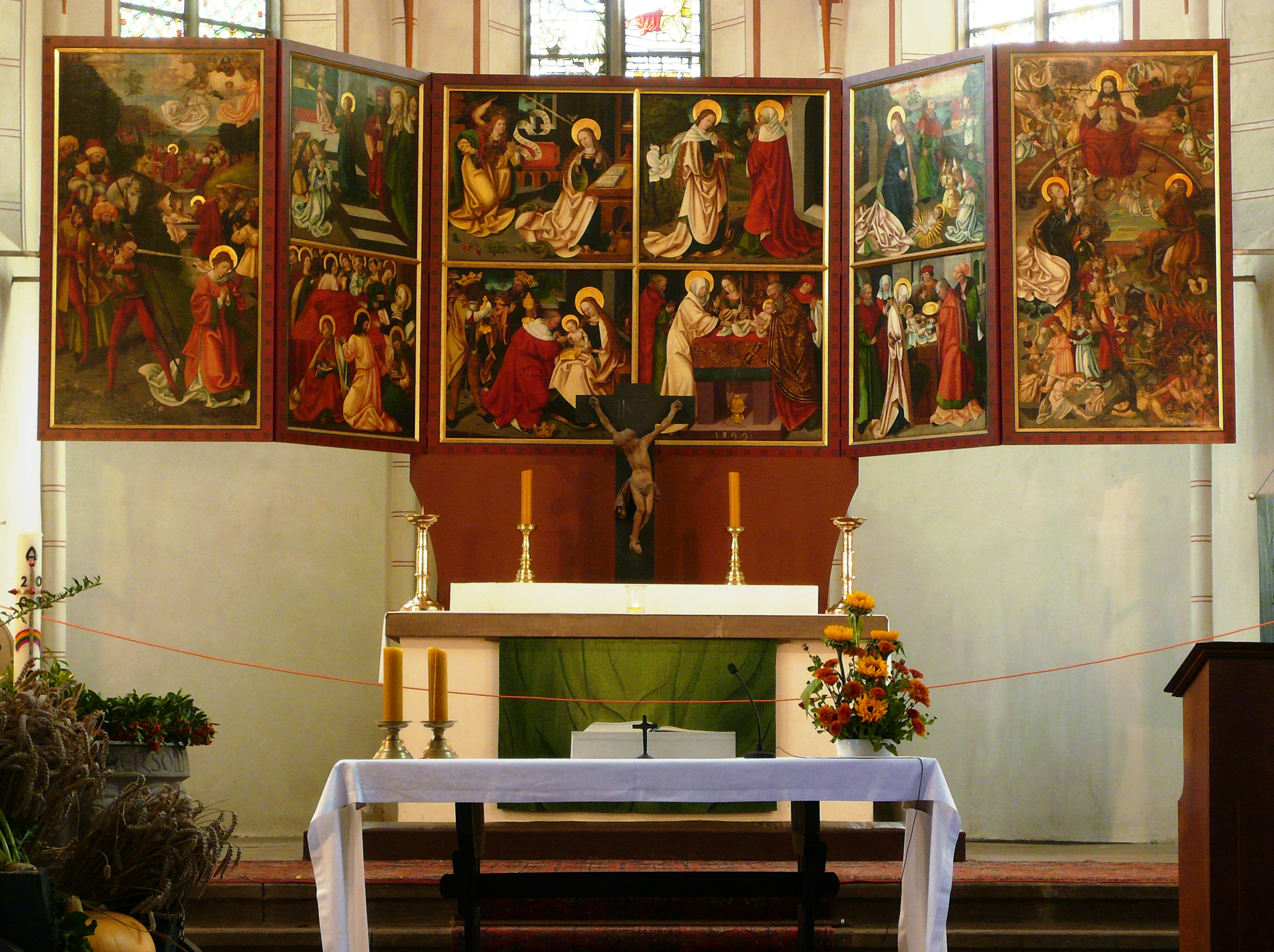 Zusammenstellung der Reste des ehem. Mareianaltar in der ev.-luth. Kirche St. Albani in Göttingen, Niedersachsen. Gemalt 1499 durch Hans von Geismar. (fotografiert während des Austausches der Altarkerzen)